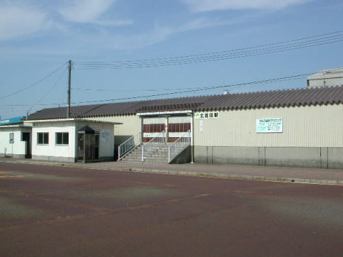 JR北吉田駅